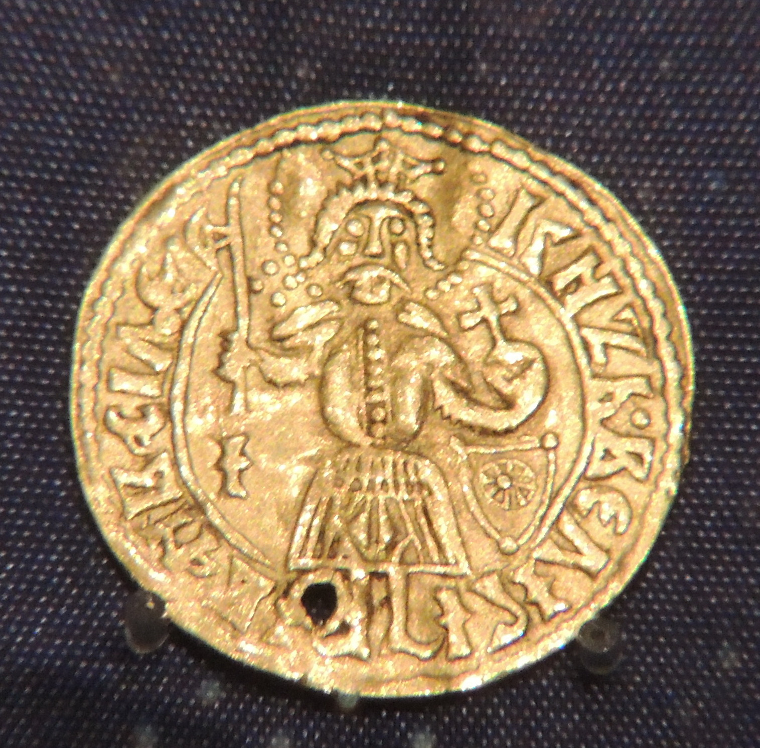 Выставка "Великий князь и государь всея Руси Иван III"